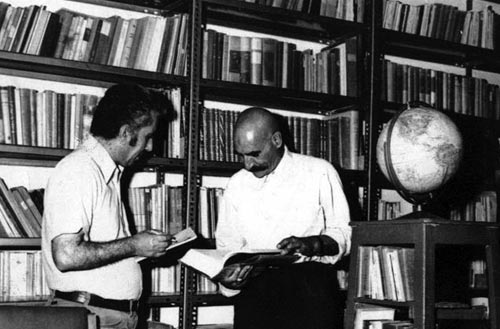 استاد کامبوزیا (راست) در حال مصاحبه در کتابخانه کامبوزیا